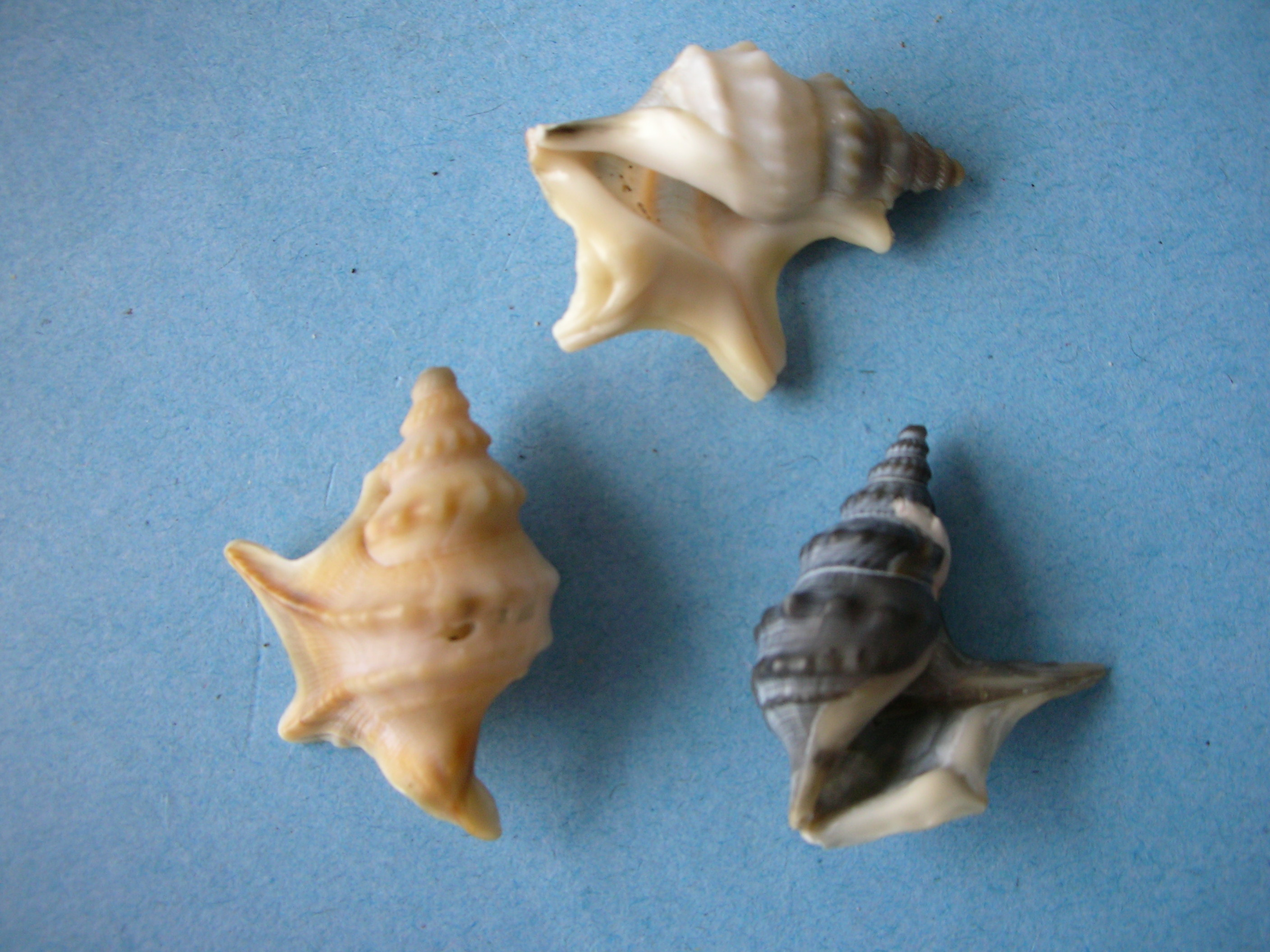 Aporrhais pespelecani, loc. Torregaveta, Bacoli (NA) Italy